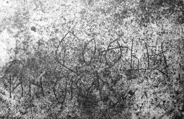 Надпись-граффити ("София инока") на крышке белокаменного саркофага великой княгини Софьи, жены Василия I. 1453. Музеи Москвского Кремля